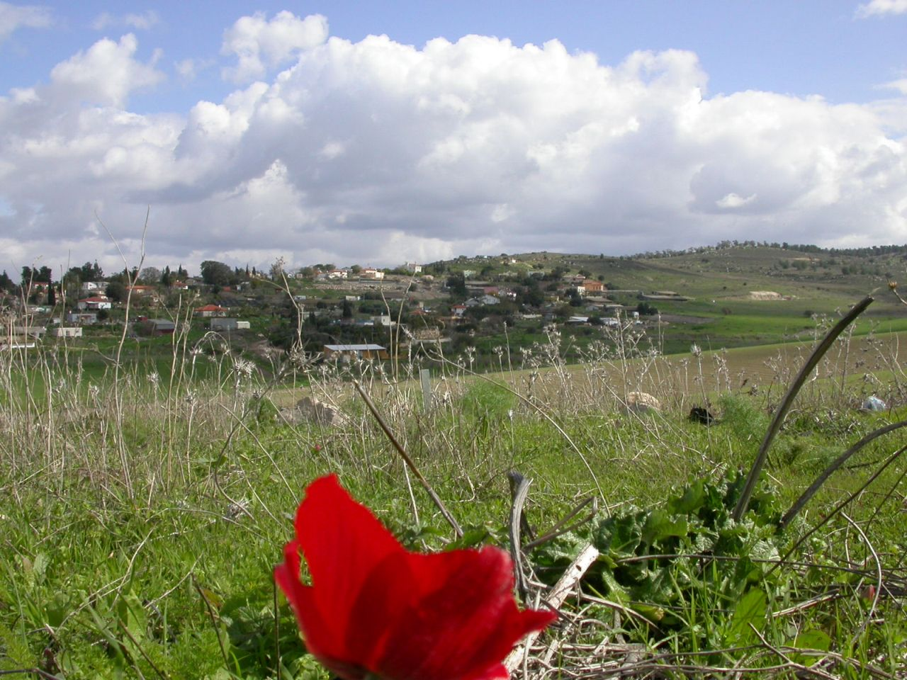 מבט על כפר אוריה מהגבעות הסמוכות אליו.